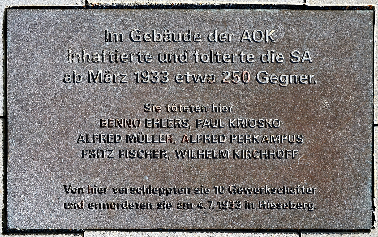 Braunschweig: Gedenktafel vor dem AOK-Gebäude, Am Fallersleber Tore 3–4, für die Opfer nationalsozialistischer Verfolgung. So z. B. für die des Stahlhelm-Putsches vom 27. März 1933 und der Rieseberg-Morde vom 4. Juli 1933.